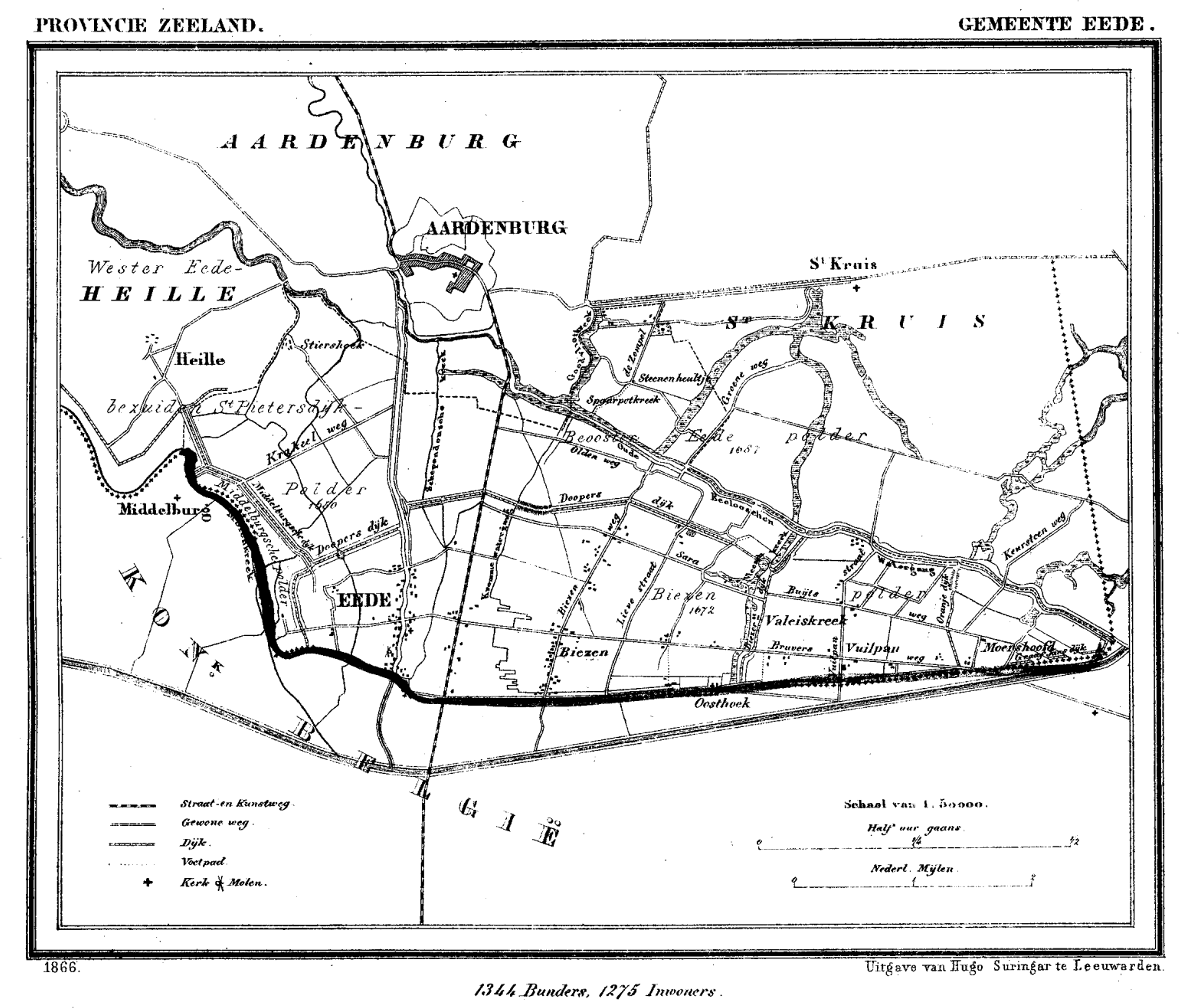 Gemeente Eede, Zeeland, Nederland